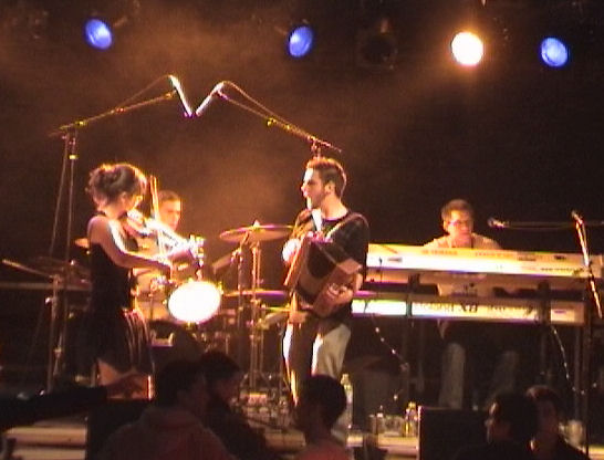 Kepelledro aux Jeudis de l'Enib pour le Dellec'Noz à Plouzané, 22 Mai 2010